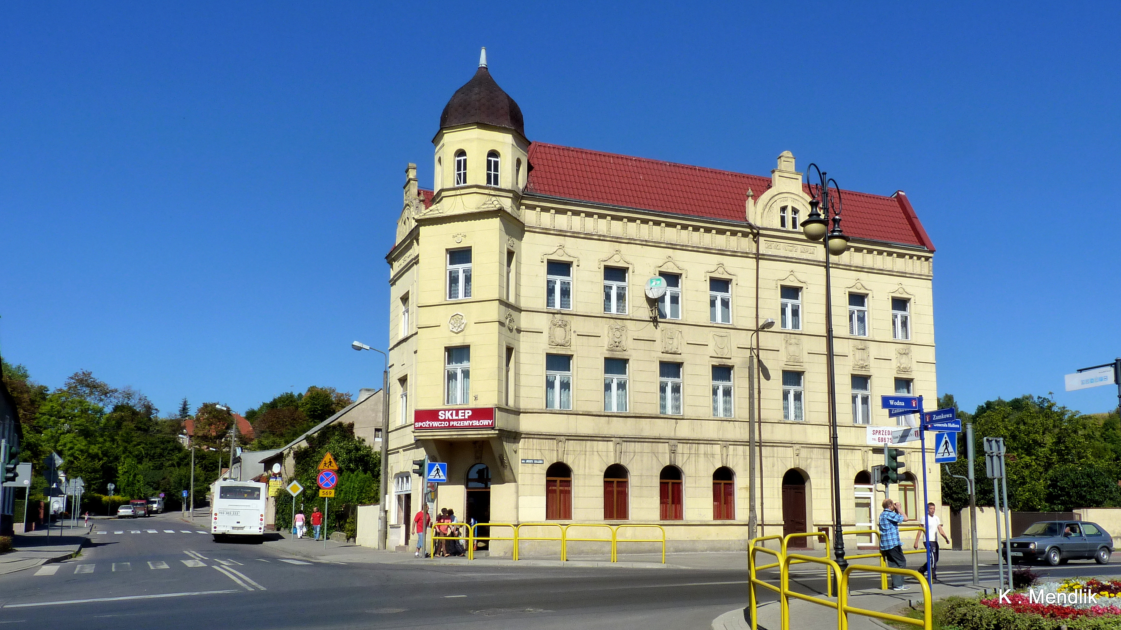 Golub-Dobrzyń, Polska - Kamienica przy ulicy Generała Hallera